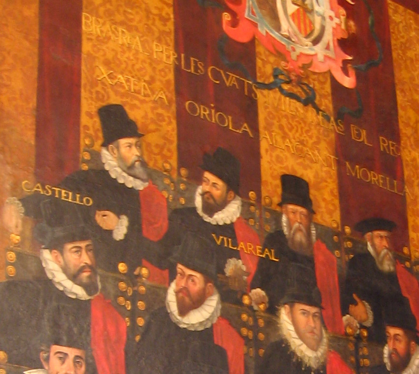 Diputats de la generalitat